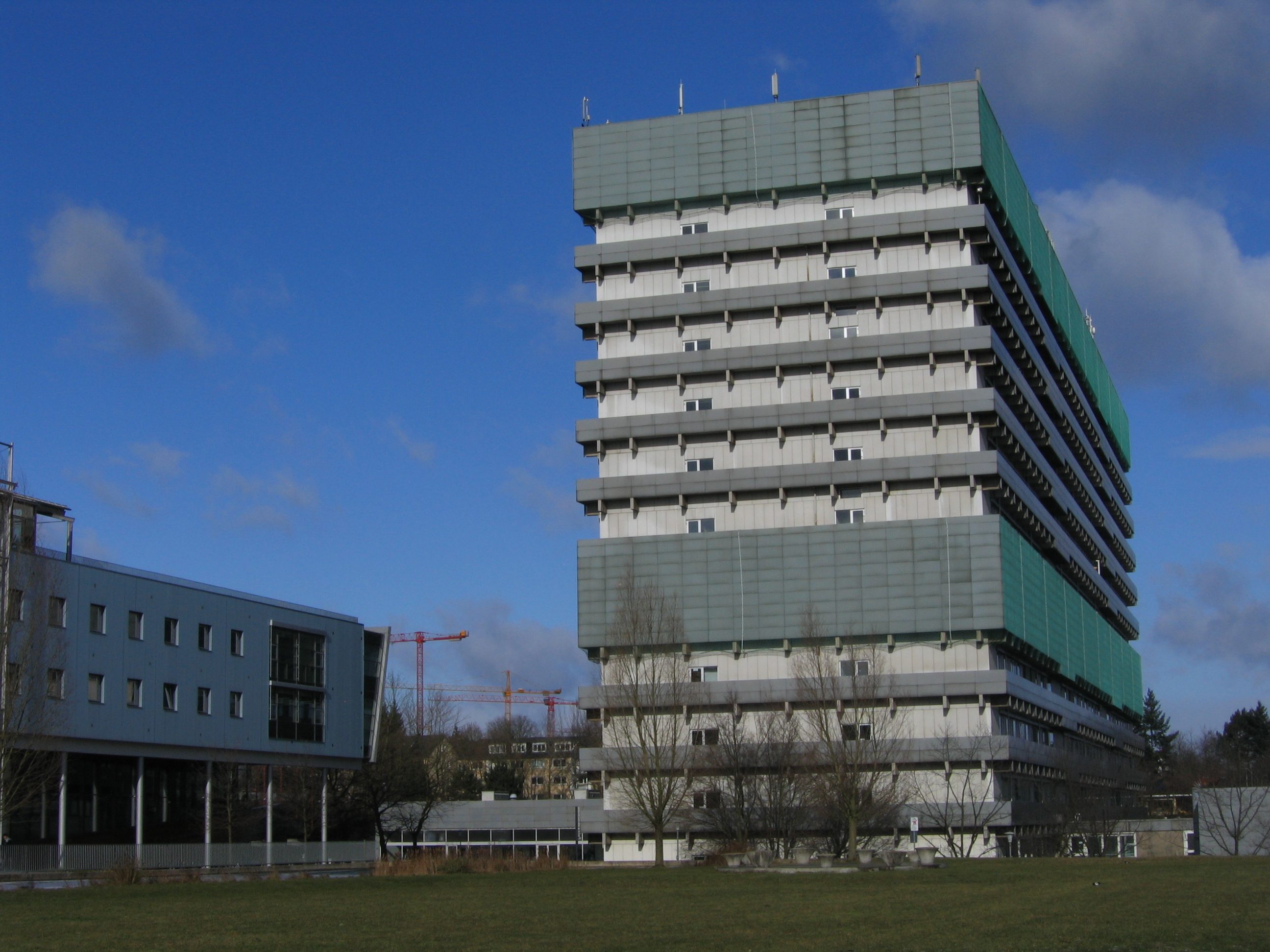 Das Interdisziplinäre Forschungszentrum für biowissenschaftliche Grundlagen der Umweltsicherung (IFZ) links, das Hochhaus der Chemischen Institute rechts.